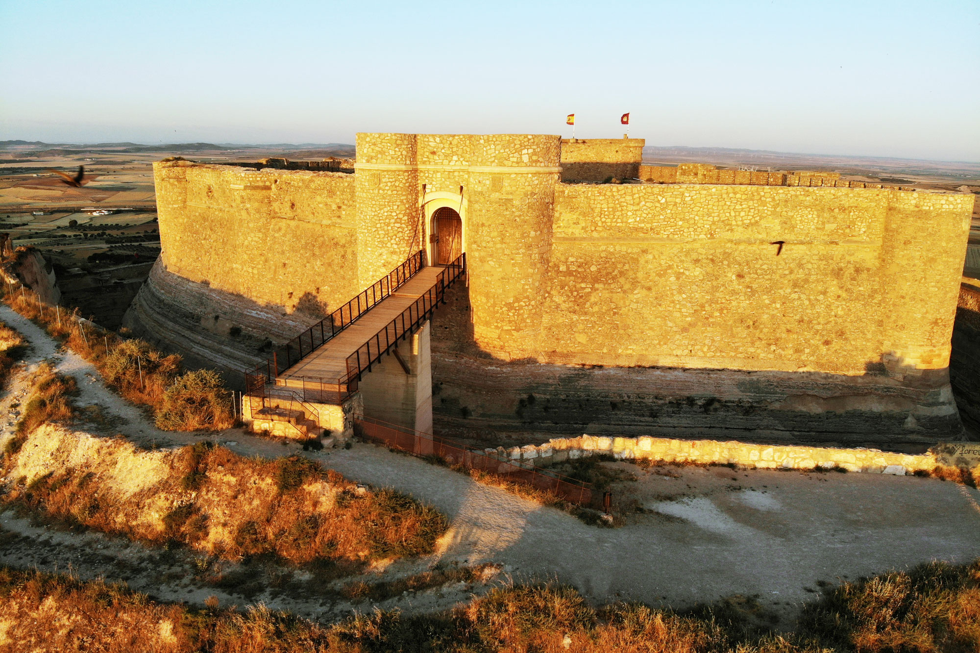 Вид на замок Чинчилья-де-Монтеарагон снят с дрона.